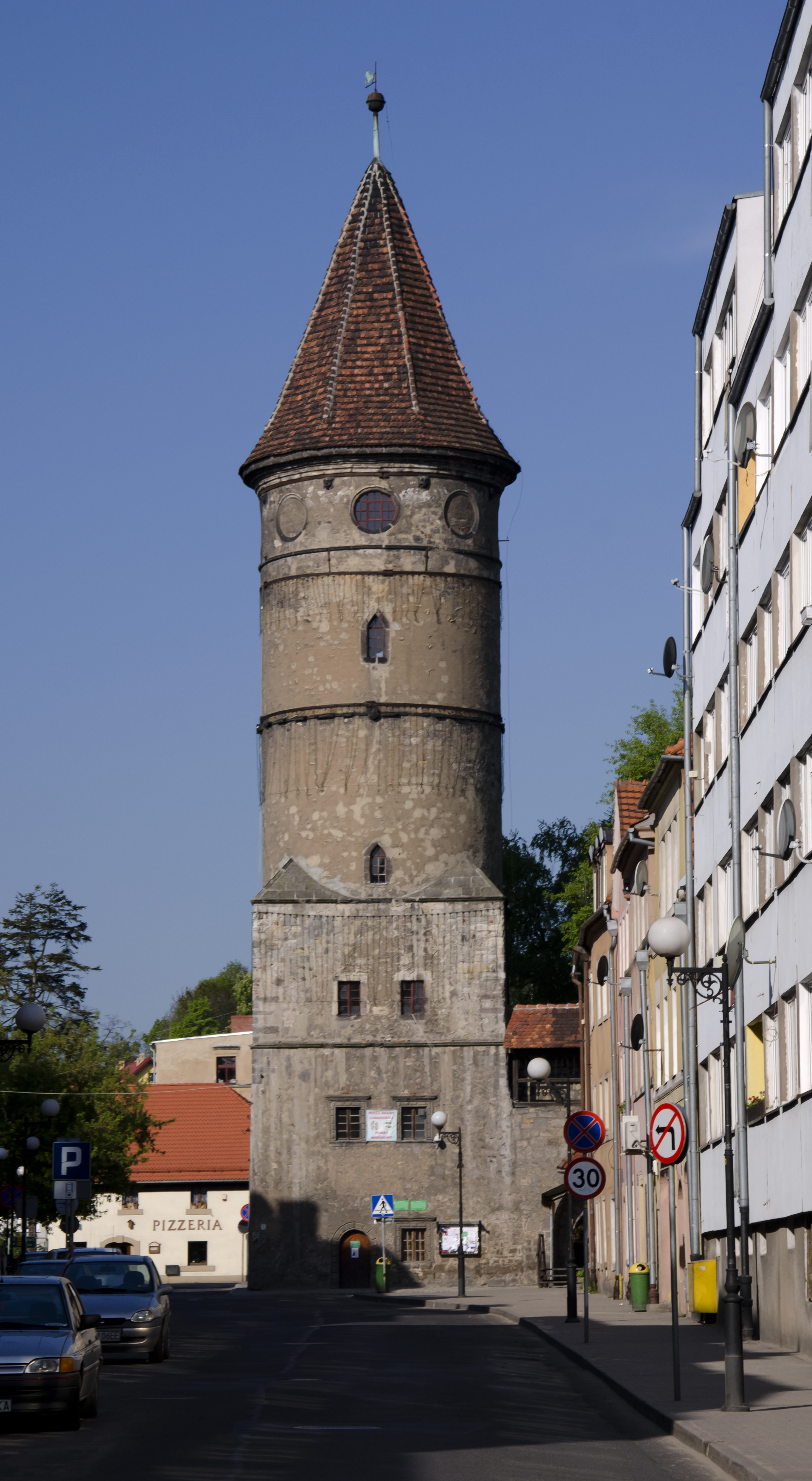 Baszta Lubańska. Miasto Lwówek Śląski.